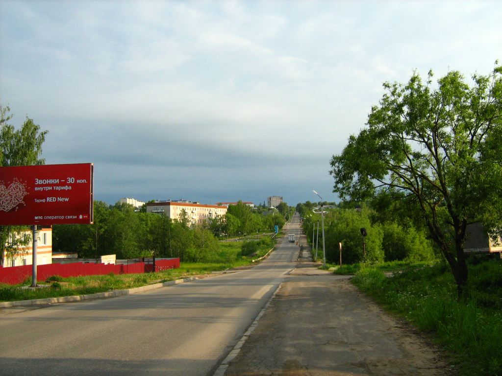 Город Кольчугино